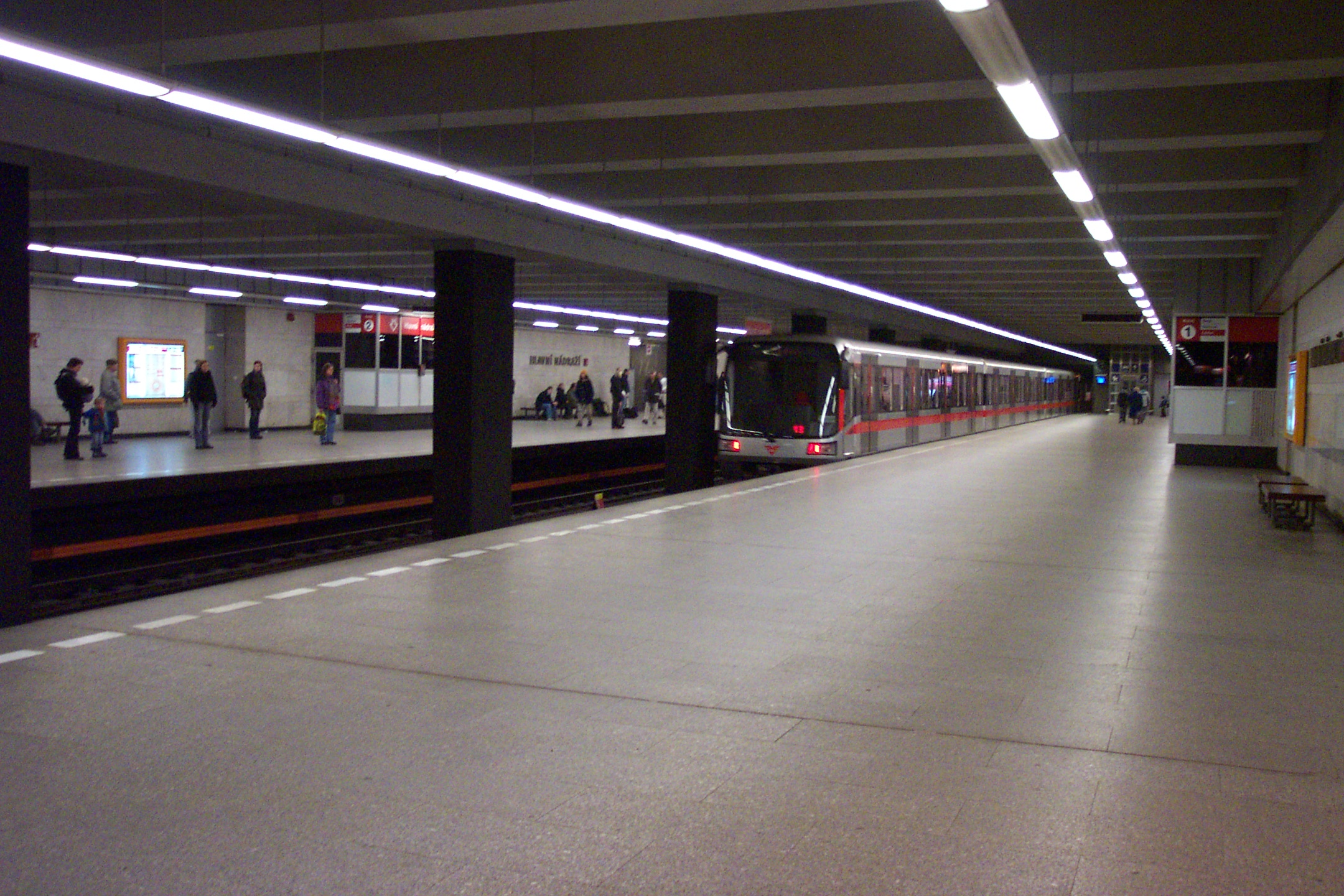 Metro station Hlavní nádraží in Prague - Stanice Hlavní nádraží metra v Praze